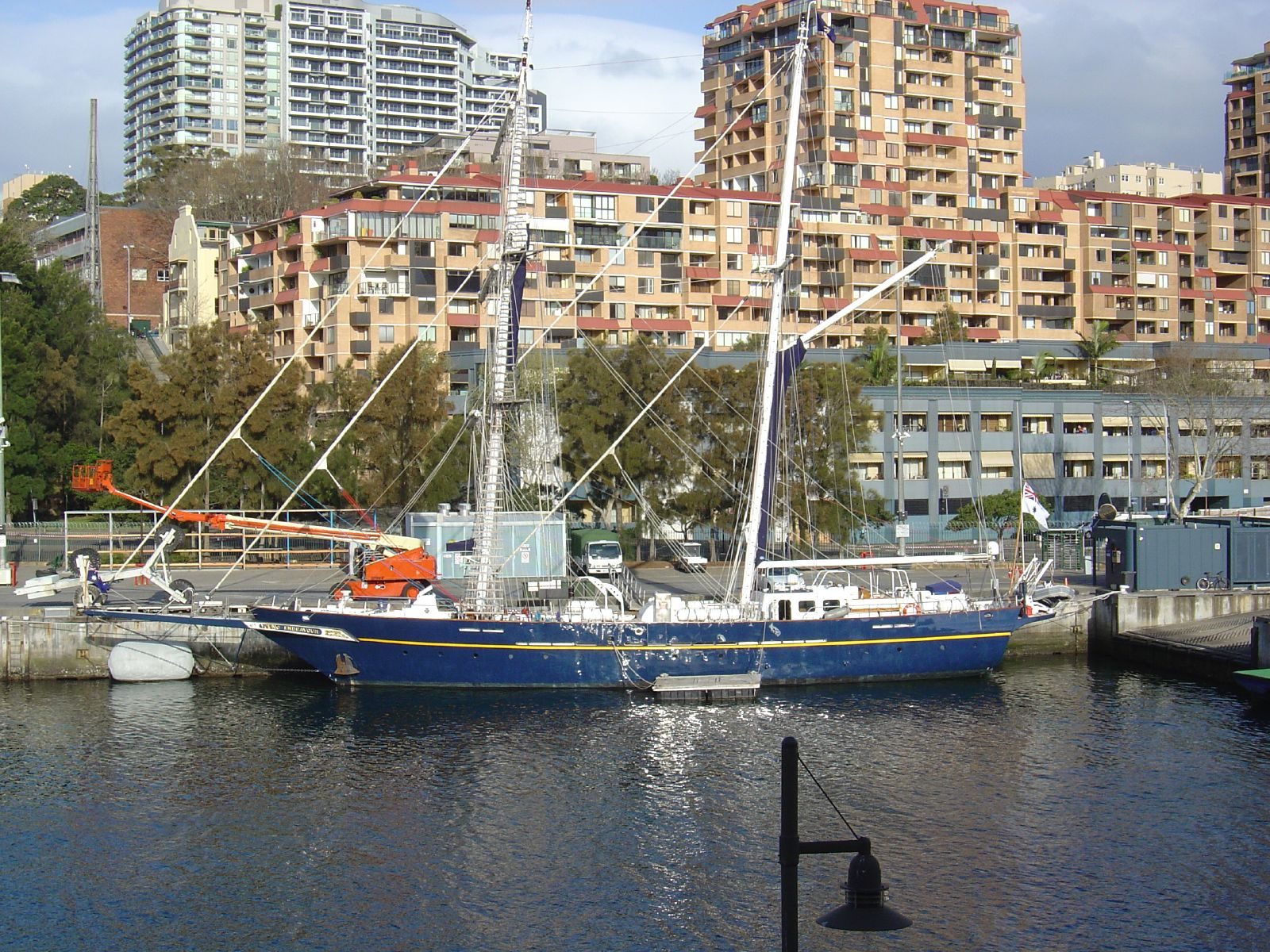 Le brick STS Young Endeavour , navire-école de la Marine royale australienne